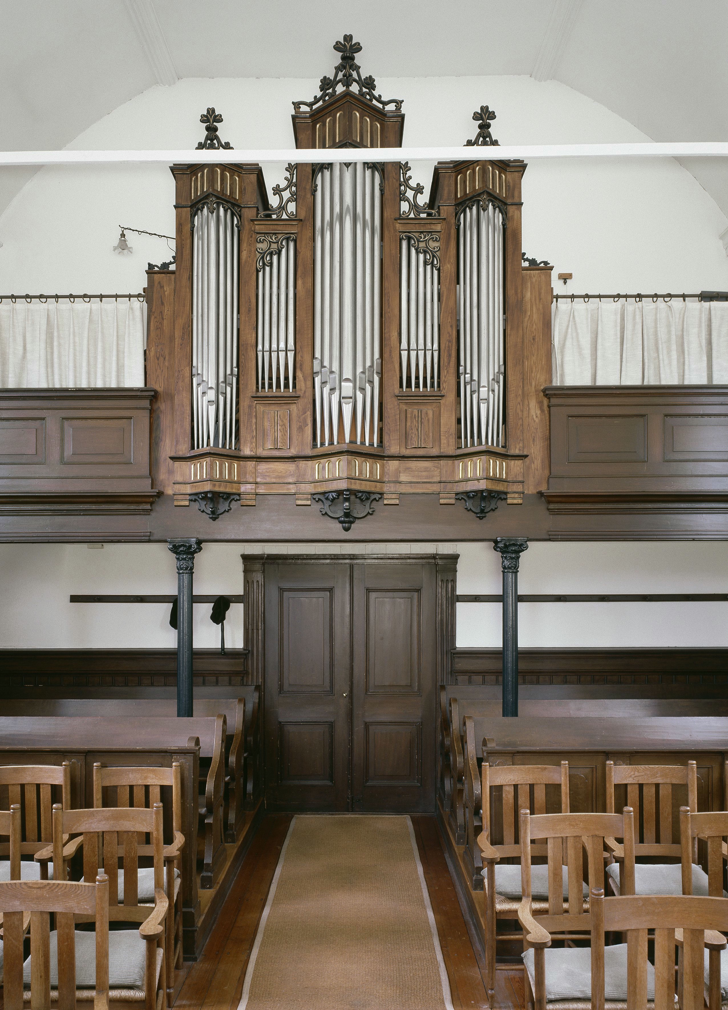 Doopsgezinde Kerk: Interieur, aanzicht orgel, orgelnummer 206 (opmerking: Gefotografeerd voor Het Historische Orgel in Nederland 1878-1886, Bladzijde 339)